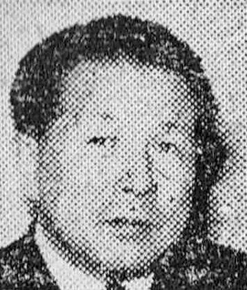 川喜田 長政 （Nagamasa Kawakita）